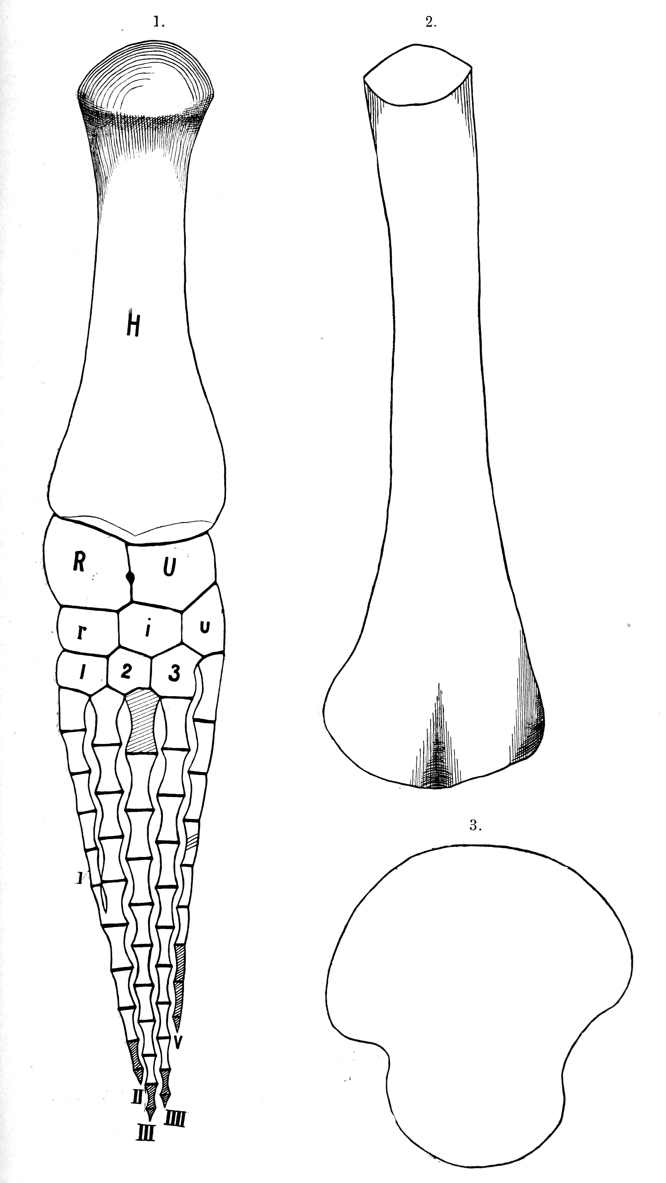 Megalneusaurus rex holotype fossils.